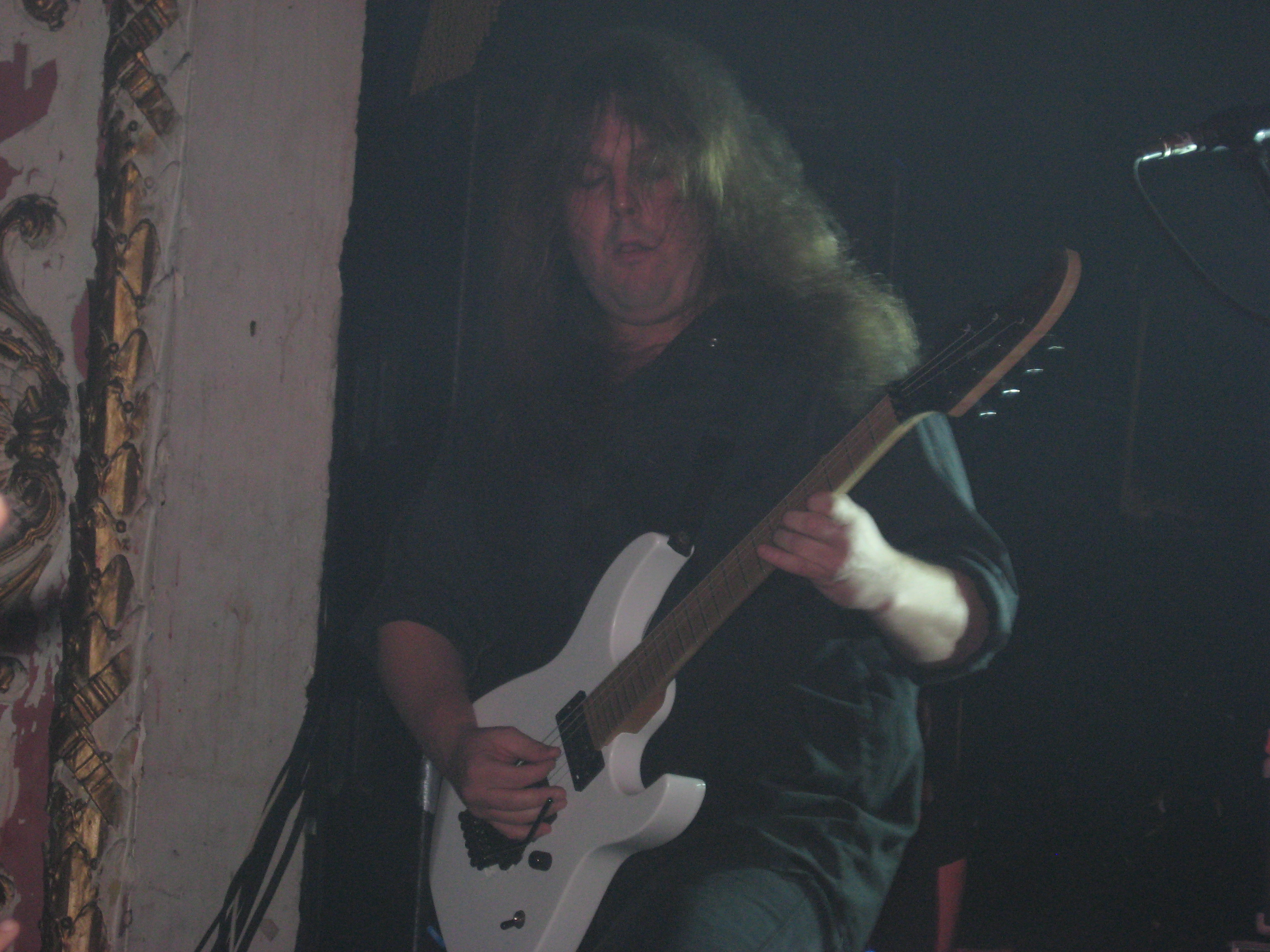 Michel Romeo